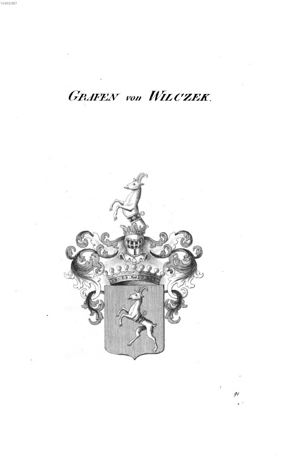 Wappen Wilczek - Tyroff HA.jpg